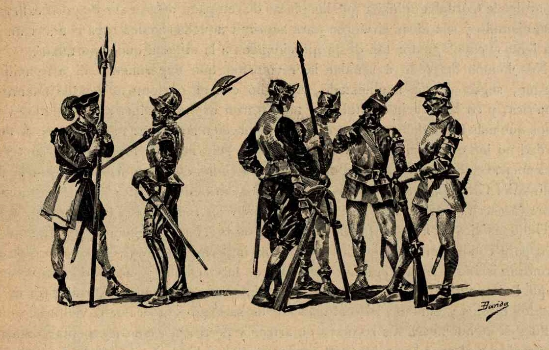 Soldados españoles.